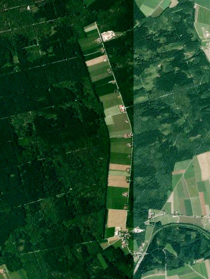 Luftaufnahme der Bayerischen Vermessungsverwaltung: Siedlung Kleinkarolinenfeld in Aying, Landkreis München, Bayern. Siedlung als Ensemble in der Bayerischen Denkmalliste aufgeführt.